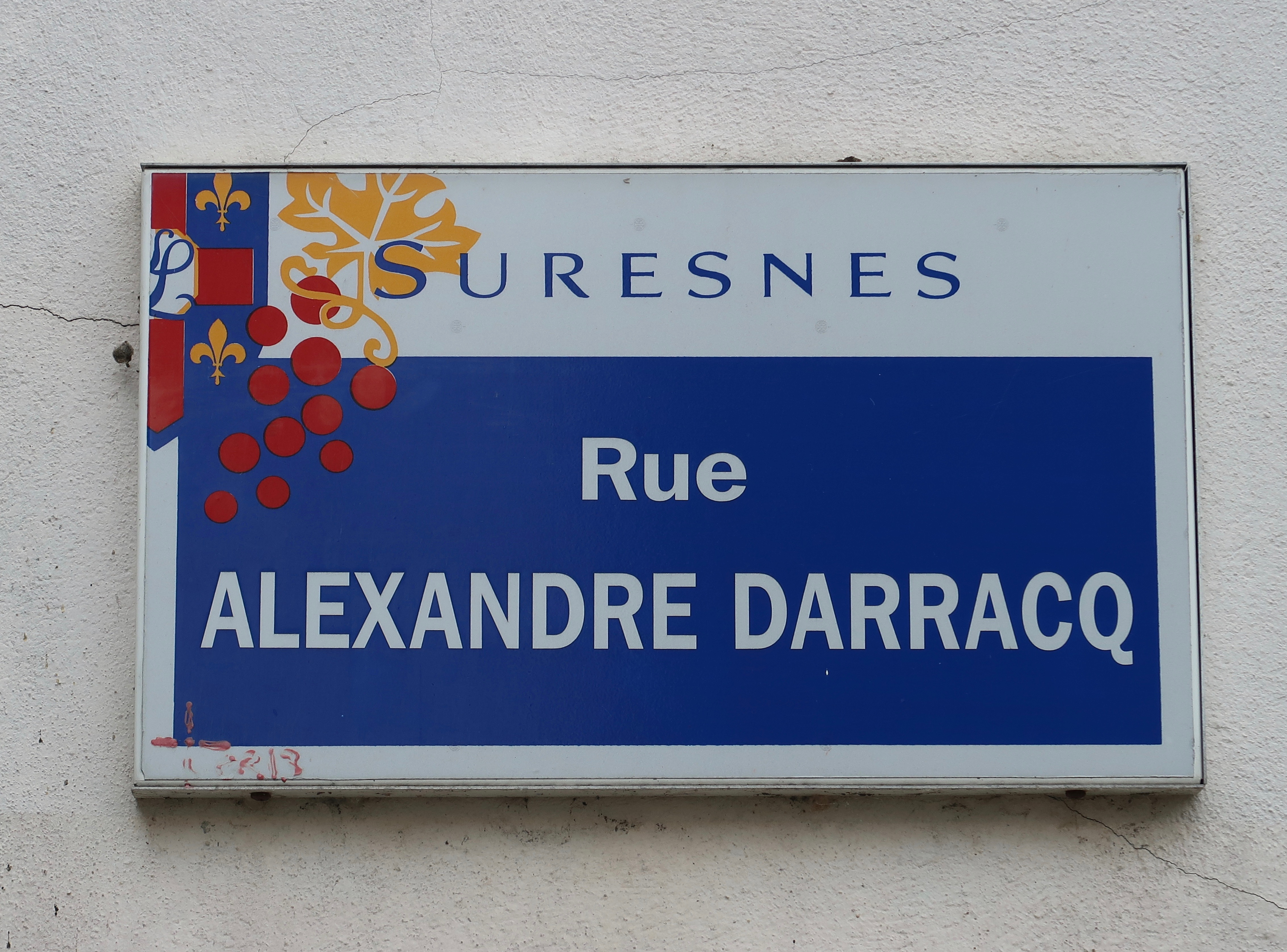 Plaque de la rue Alexandre-Darracq à Suresnes (Hauts-de-Seine).